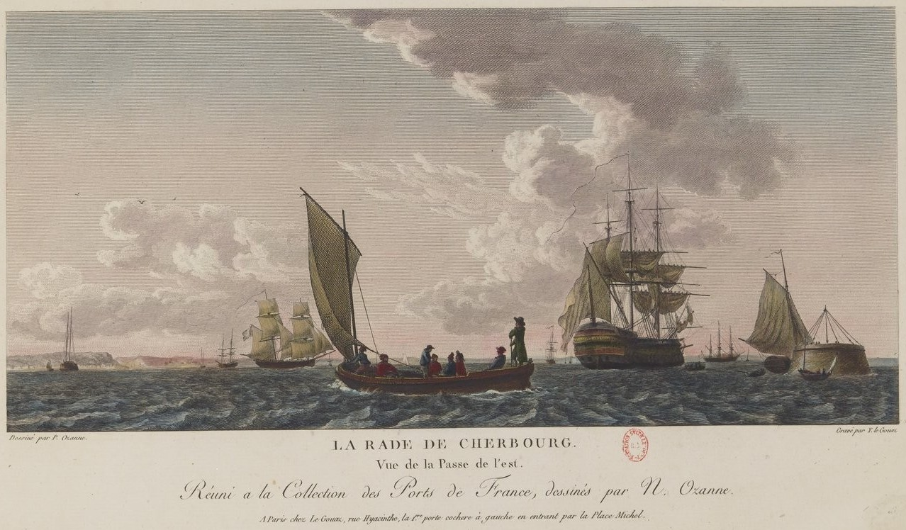 Estampe tirée des Nouvelles vues perspectives des ports de France, dessinées pour le Roi par M. Ozanne. Vue de la rade Cherbourg avant les grands travaux décidés par Louis XVI et poursuivis au XIXème siècle.